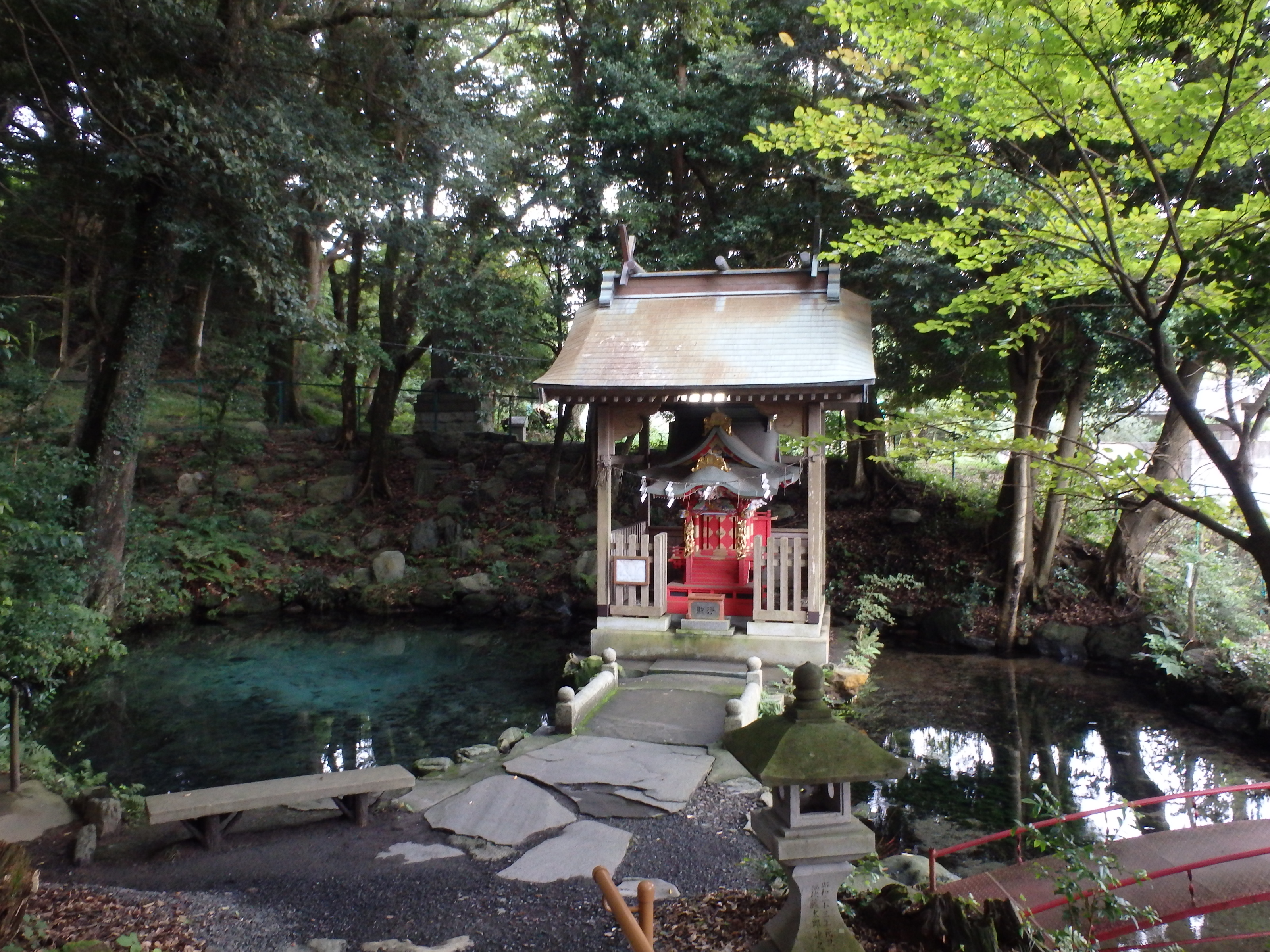 平成の名水百選のひとつ